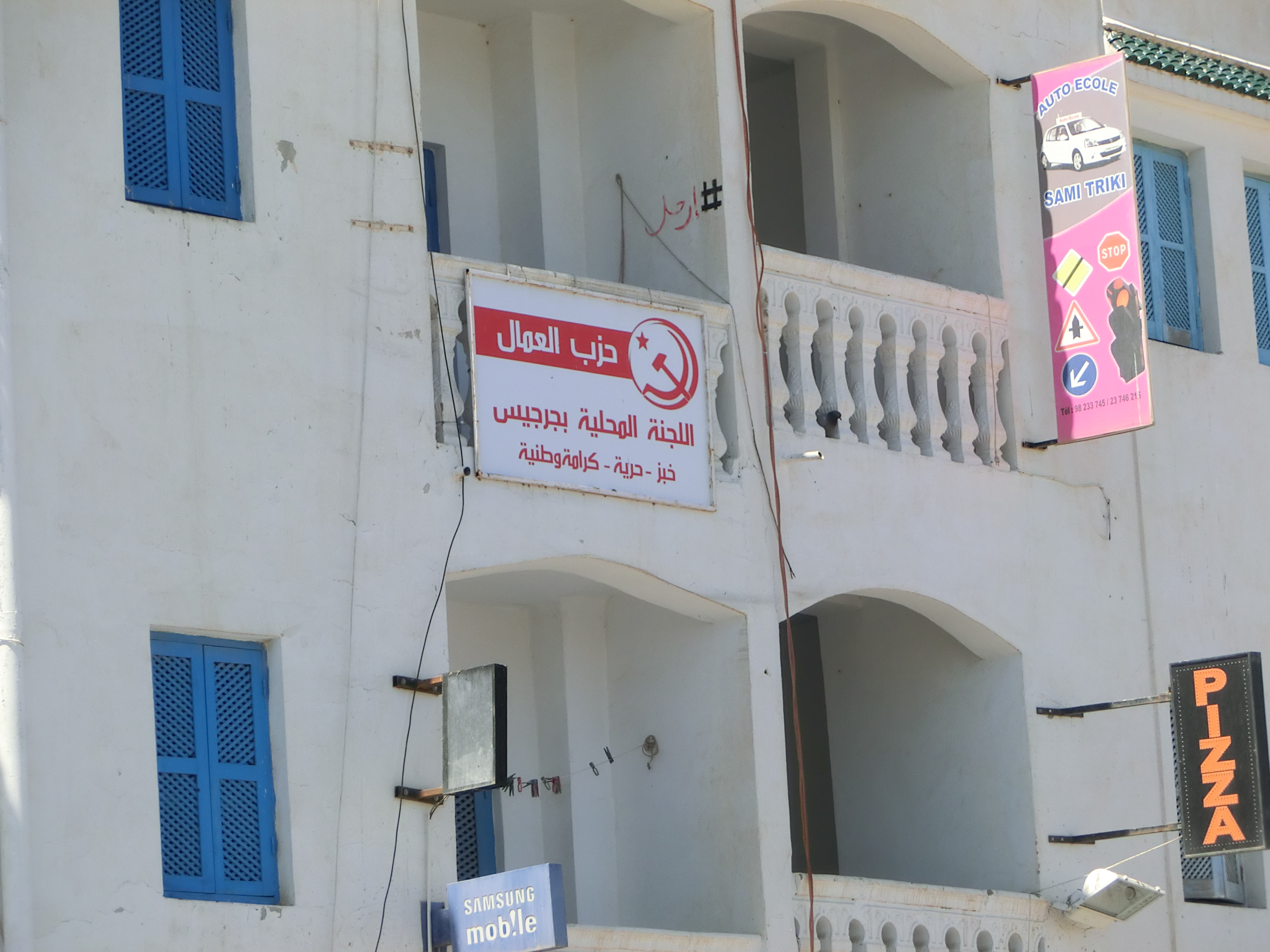 Büro der Tunesischen Arbeiterpartei in Zarzis, Frühjahr 2014